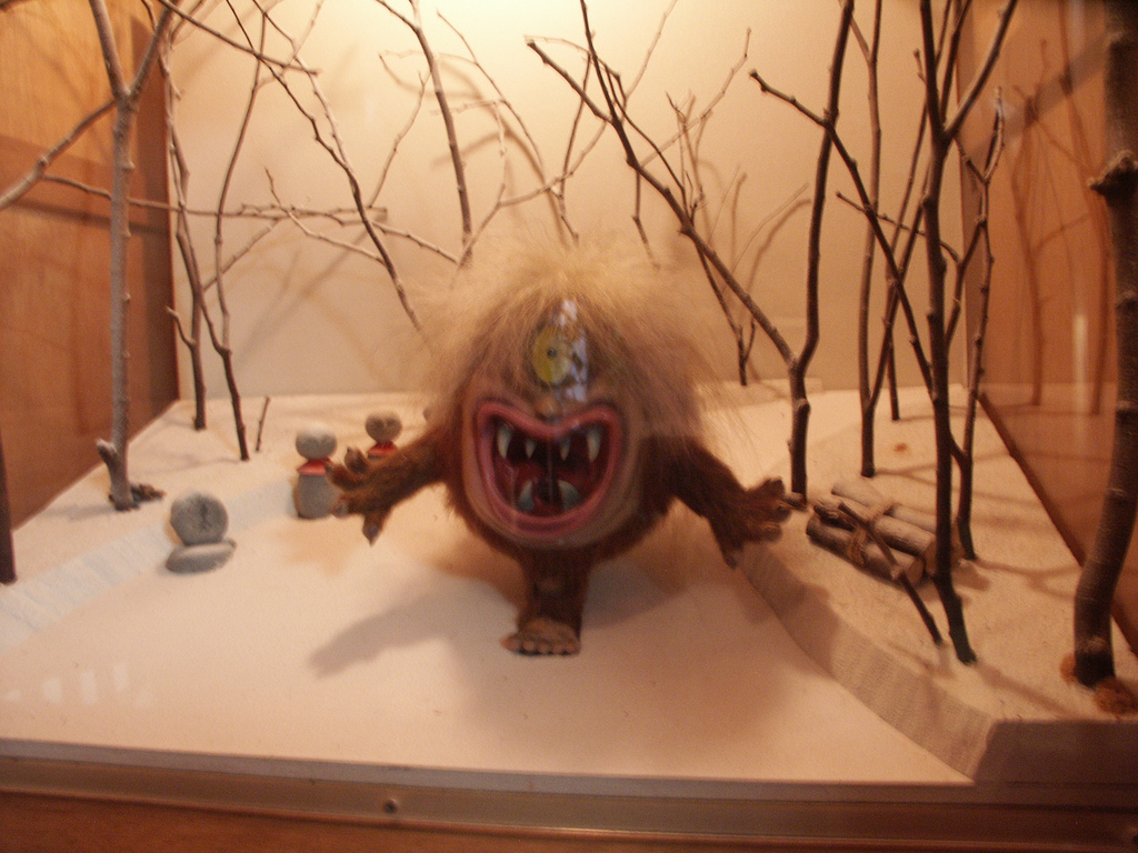 Yokai, Ippon-datara